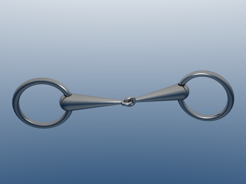 a snuffle bit with single joint mouthpiece and loose bit ring. Un mors simple, à anneaux circulaires. Les anneaux ont 2 degrés de liberté en rotation. Modélisé sous Blender par LardonCru.